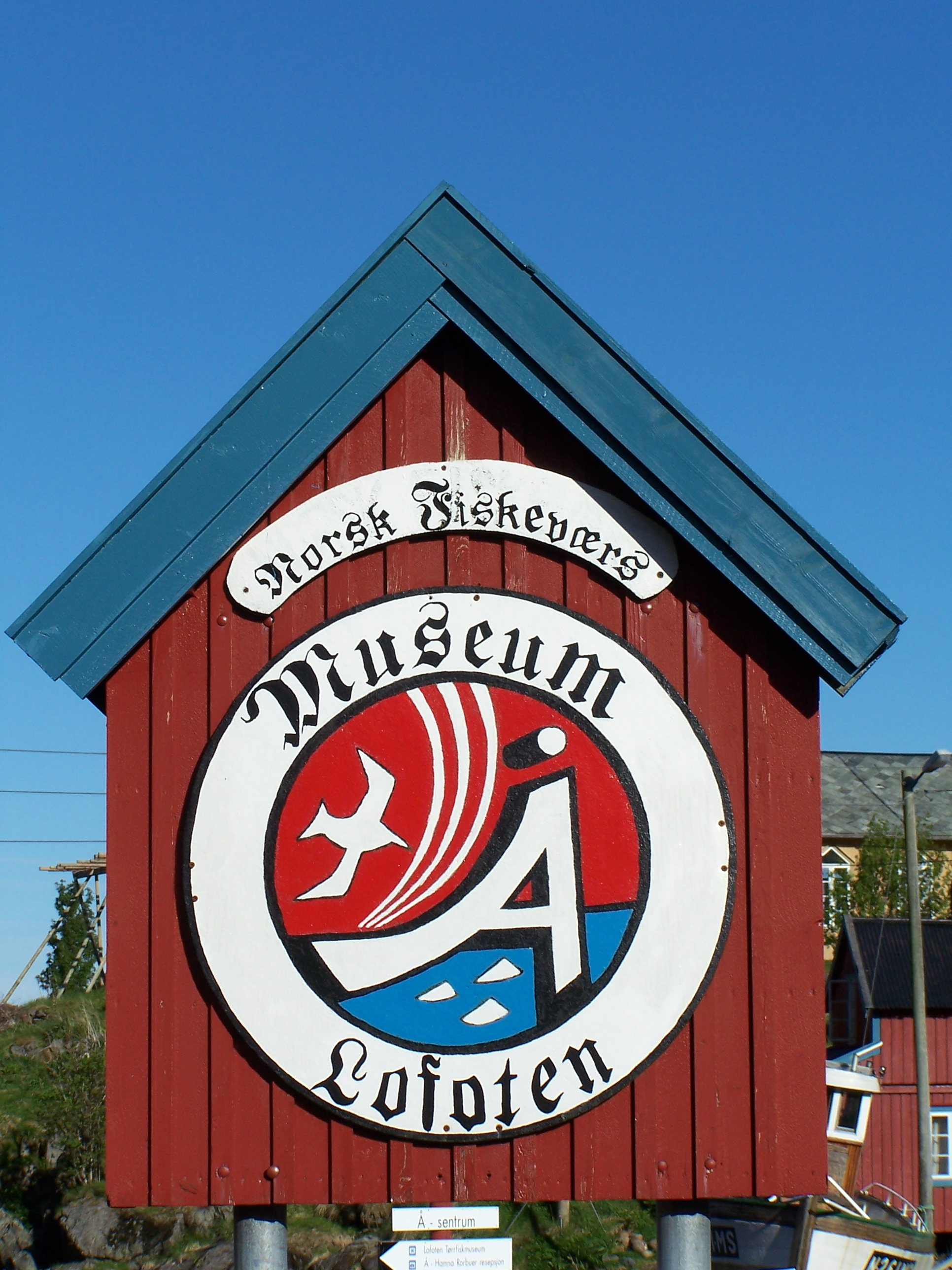 Ortsschild von A i Lofoten